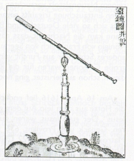 Fernrohr auf Stativ